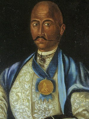 Сидір Білий. Фрагмент портрету з видання: Белецкий П. Украинская портретная живопись XVII–XVIII вв., Ленинград, 1981